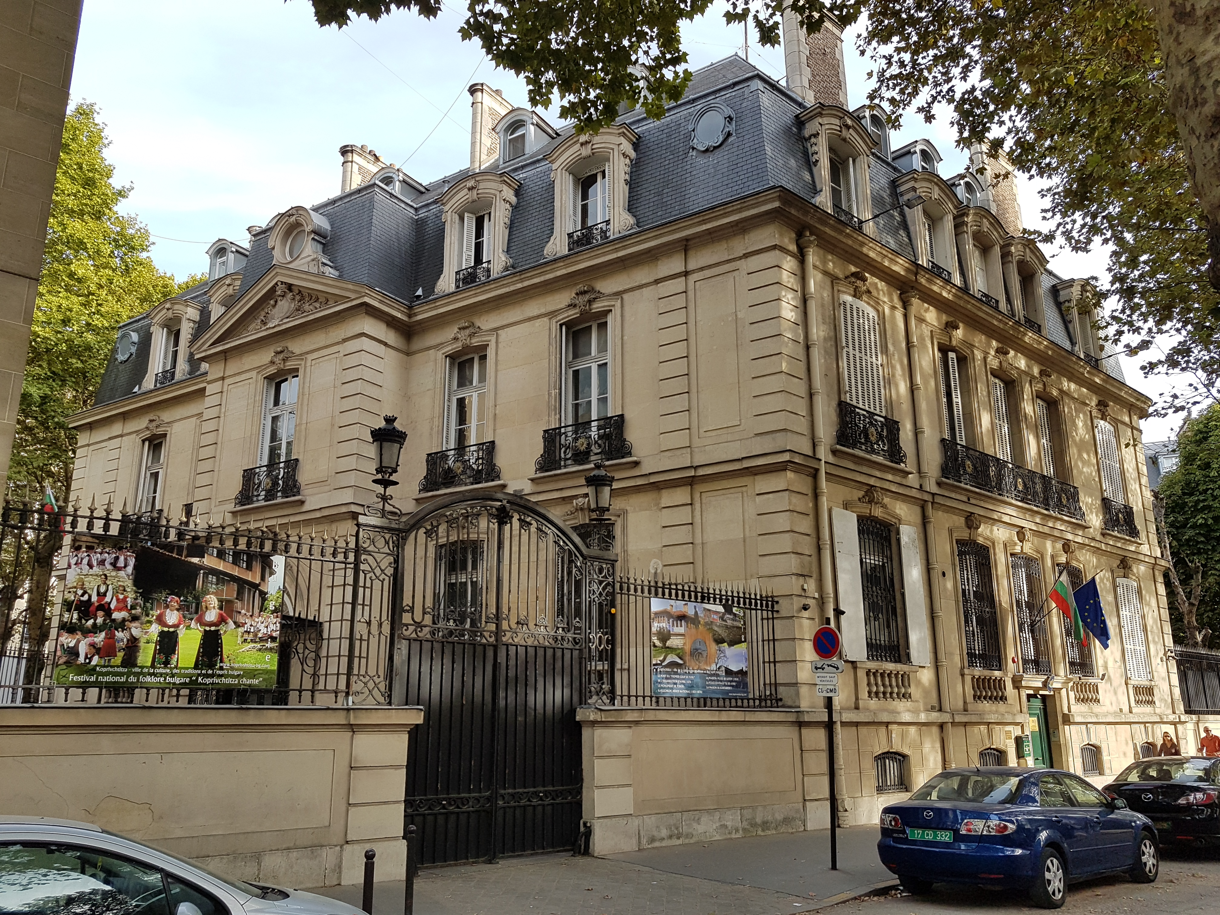 Historistisches Gebäude in Paris-7. Arrondissement